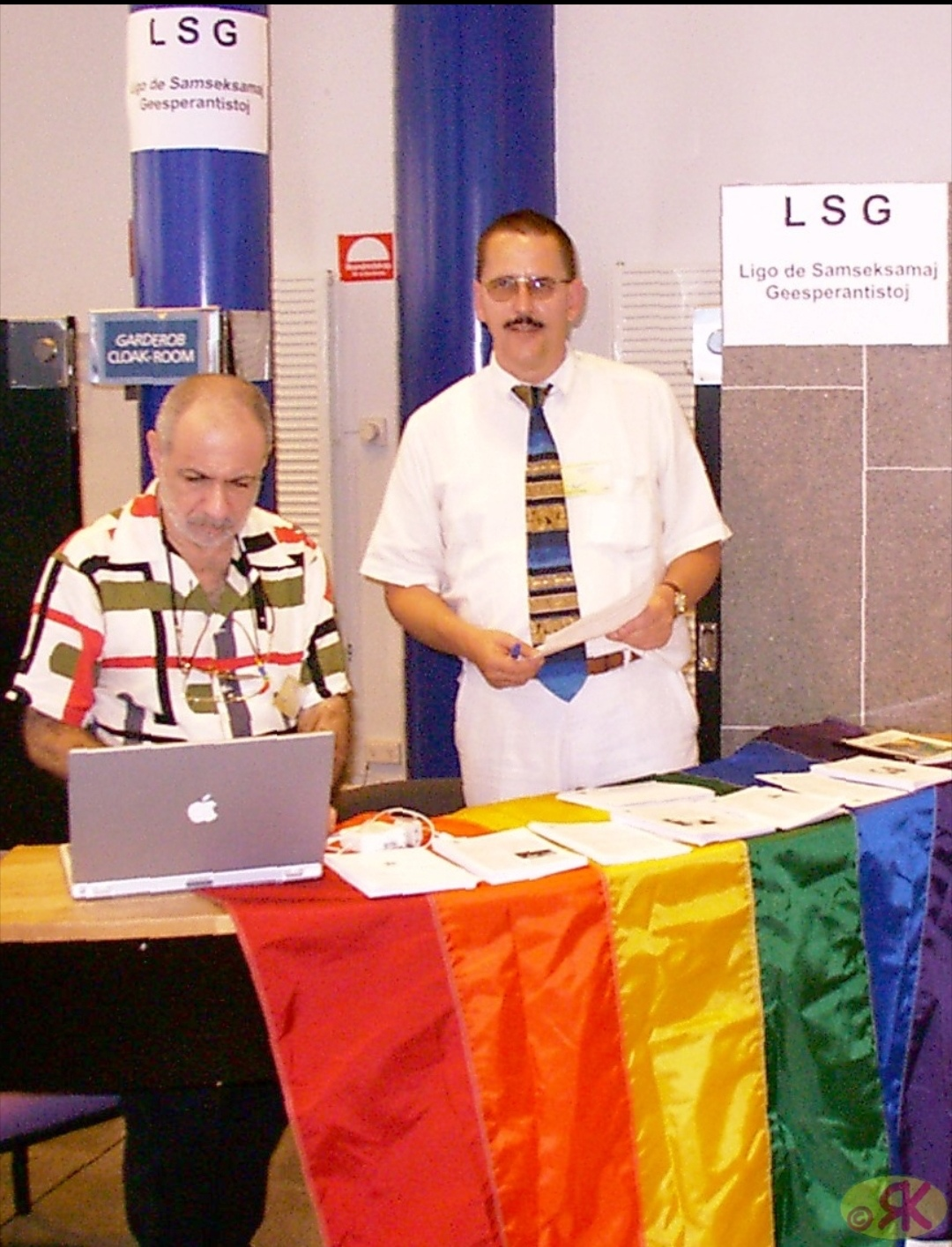 Rolf Karbisto kaj Victor Arnold Victor, iamaj estraranoj de LSG